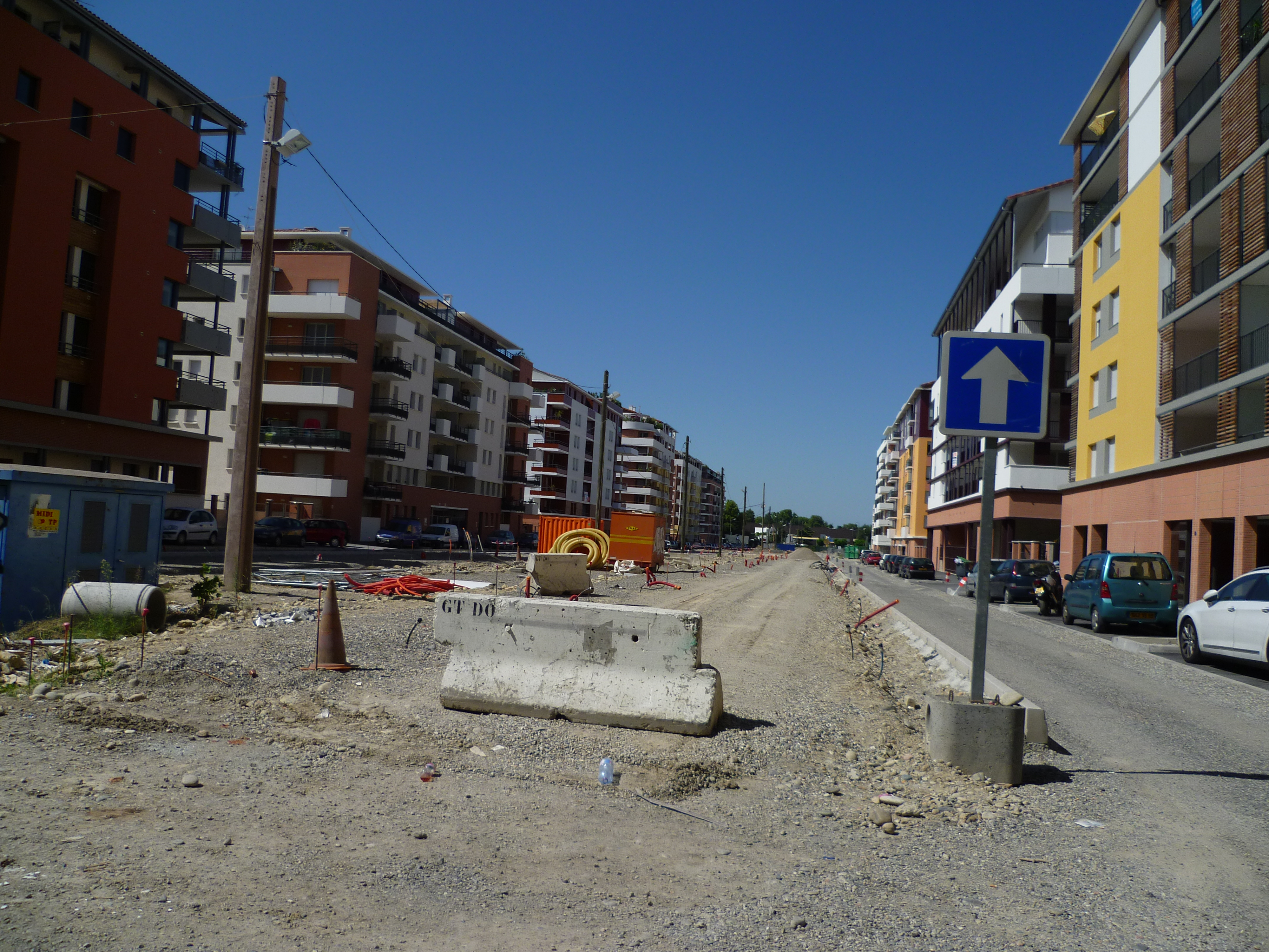 Nouveaux immeubles et nouvelle rue (rue Cécile Brunschvicg) à Toulouse.